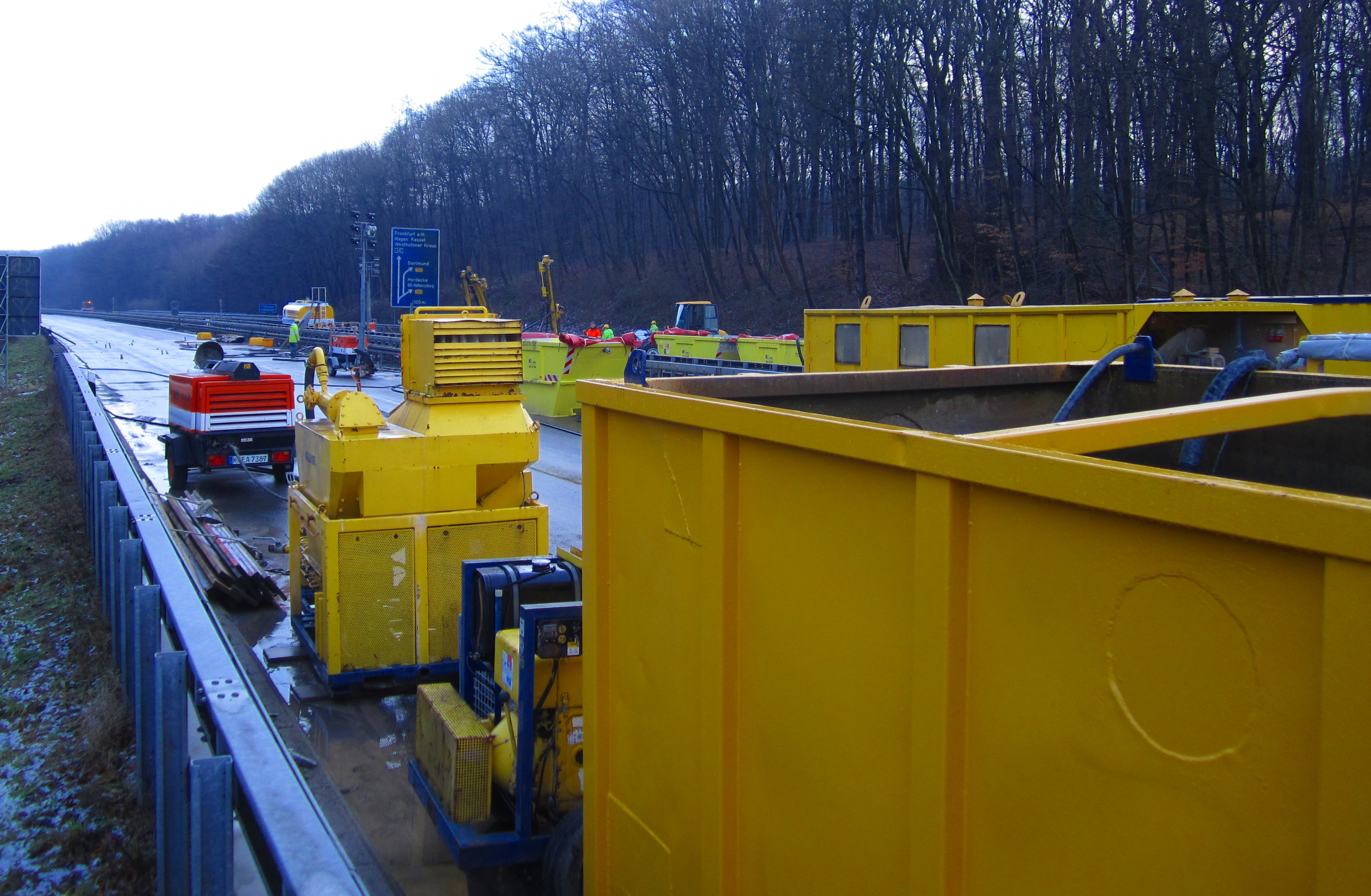 Verfüllung der Hohlräume unter der Autobahn A45 im Januar 2012, die durch Tagesbrüche der Zeche Gottessegen entstanden sind und zu einer Vollsperrung der A45 zwischen den Kreuzen Witten und Dortmund Süd für ca. zwei Wochen sorgten.